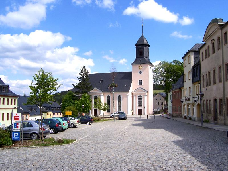 Kirche und Markt in Grünhain Sonstiges: ...